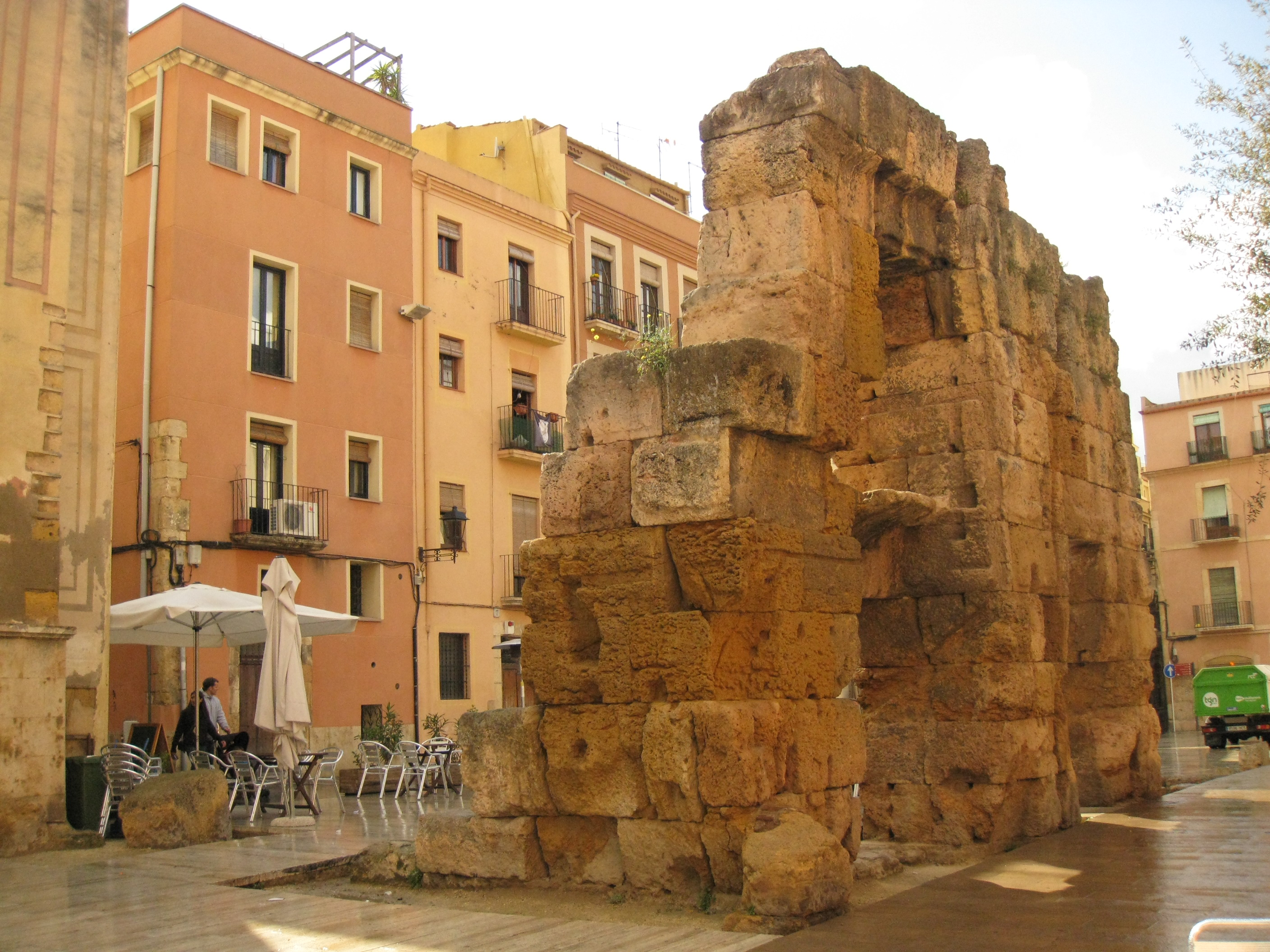 Conjunt històric de Tarragona